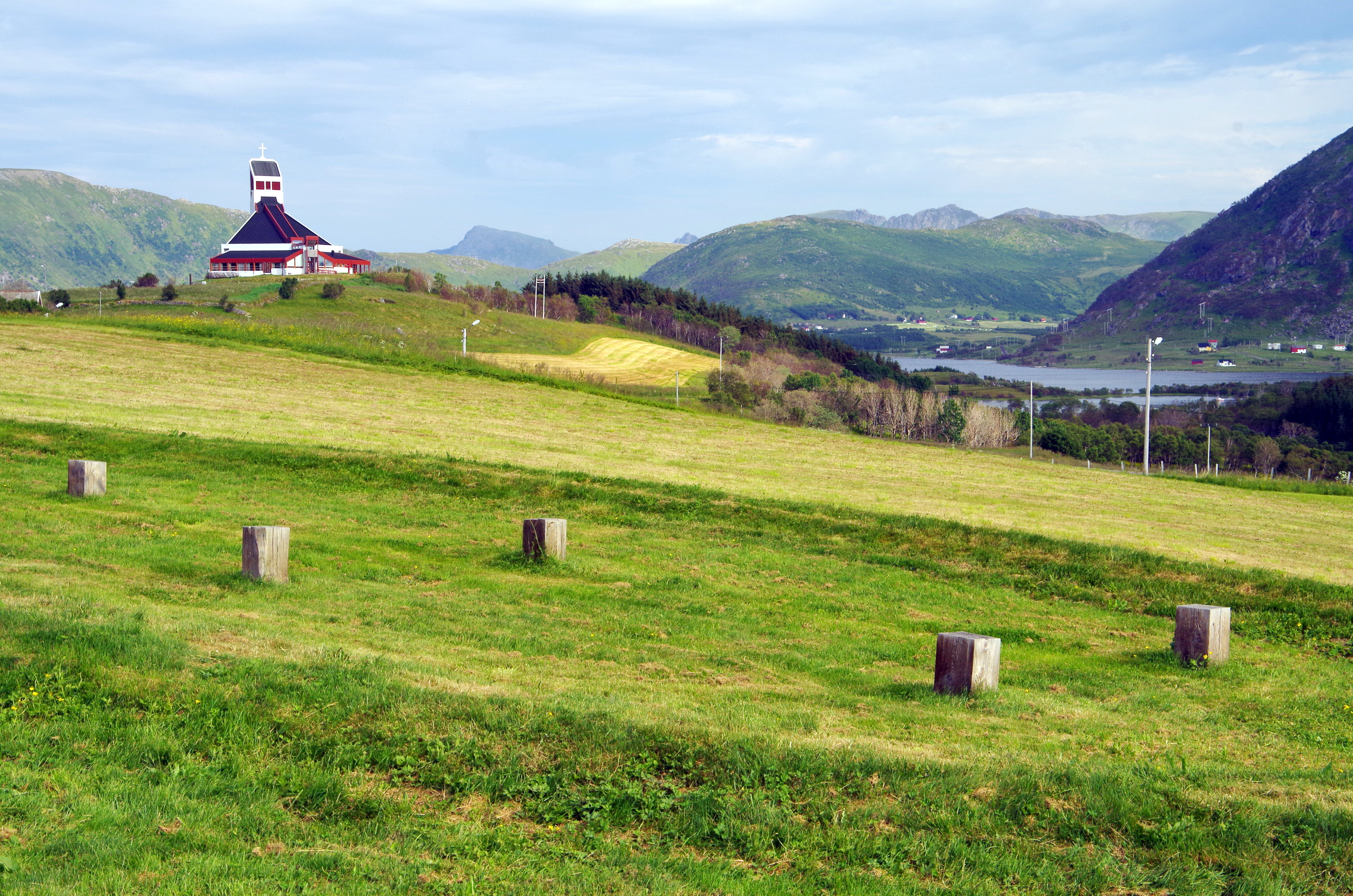 Wikingermuseum Borg, Kirche Borg, im Vordergrund Position der Pfosten des originalen Langhauses